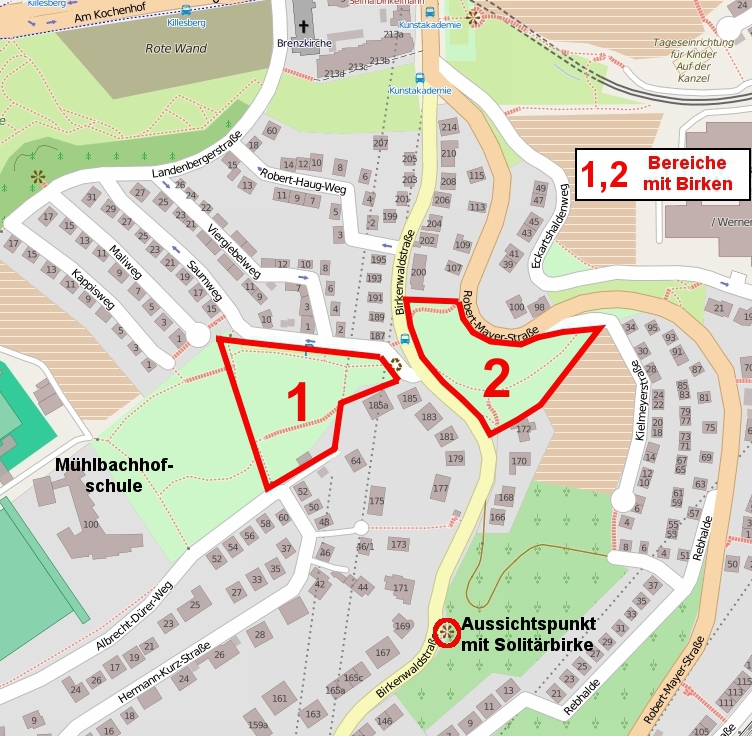 Karte eines Teilstücks der Oberen Birkenwaldstraße in Stuttgart. Der Name der Birkenwaldstraße geht auf den Flurnamen Birkenwald zurück. An diesen Wald erinnern noch heute die beiden rot umrandeten Grünanlagen mit Birken und eine Aussichtsplattform mit einer alten Einzelbirke.